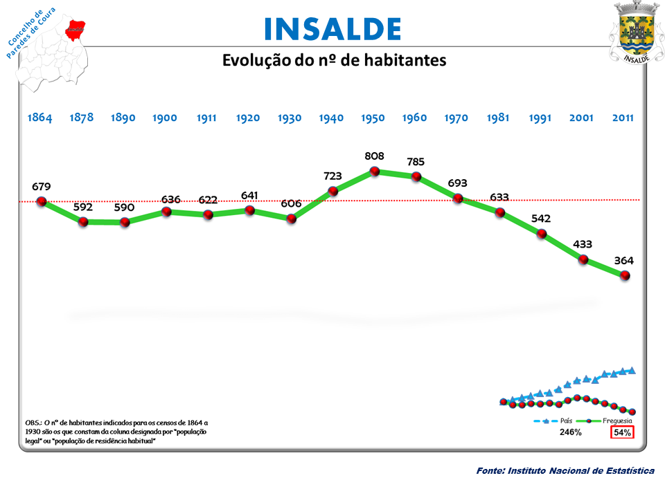 Censos 1864/2011